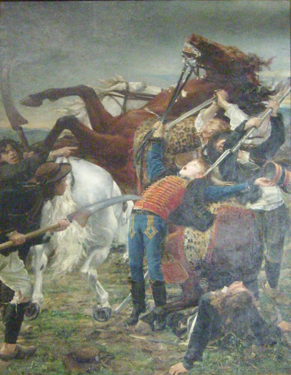 La mort de Bara. huile sur toile. Musée d'Orsay.